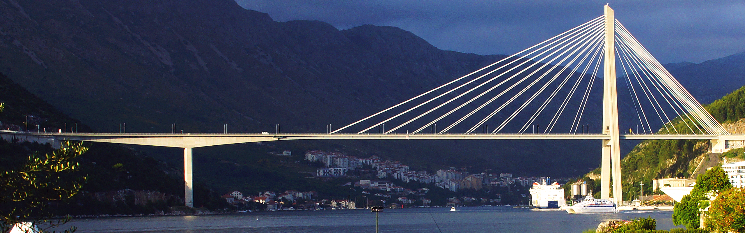 Most dr. Franja Tudmana (2001). Die Franjo-Tudman-Brücke in der Perspektive von der Adria-Bucht - Dubrovnik Kroatien - Foto Wolfgang Pehlemann DSC04715